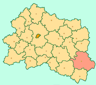 Orel Oblast map by Al Silonov Карта районов Орловской области